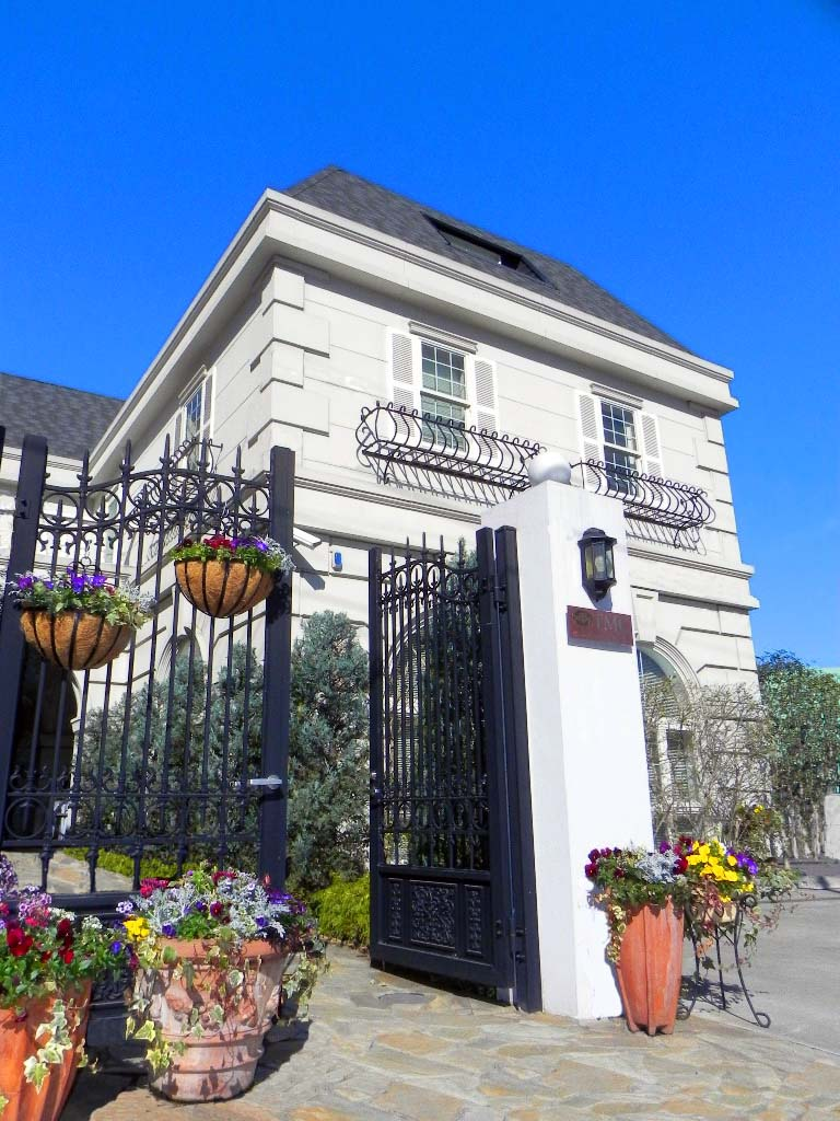 東京音楽センター 東京本部